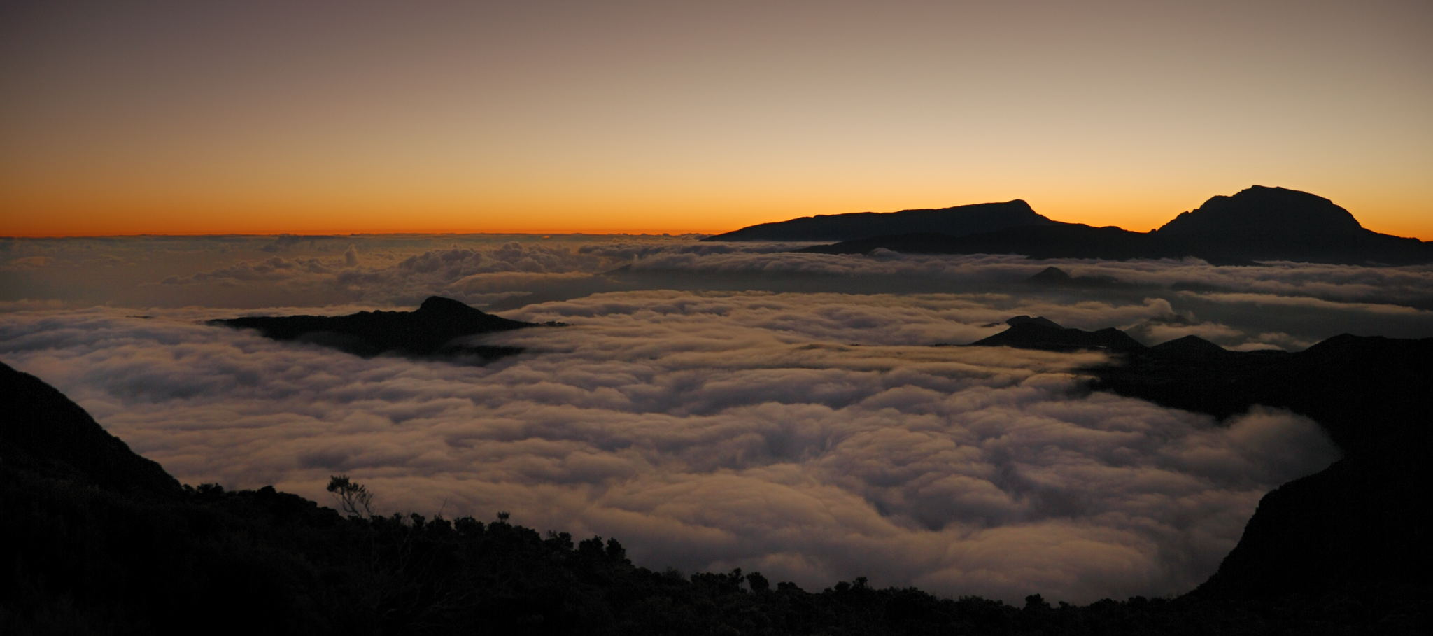 Le Nez de Boeuf au second plan dans une mer de nuages